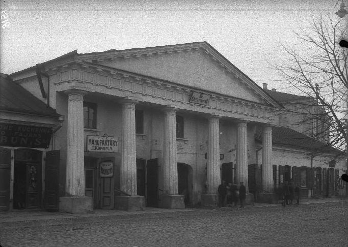 Беларуская (тарашкевіца): Горадня (Horadnia). Ратуша